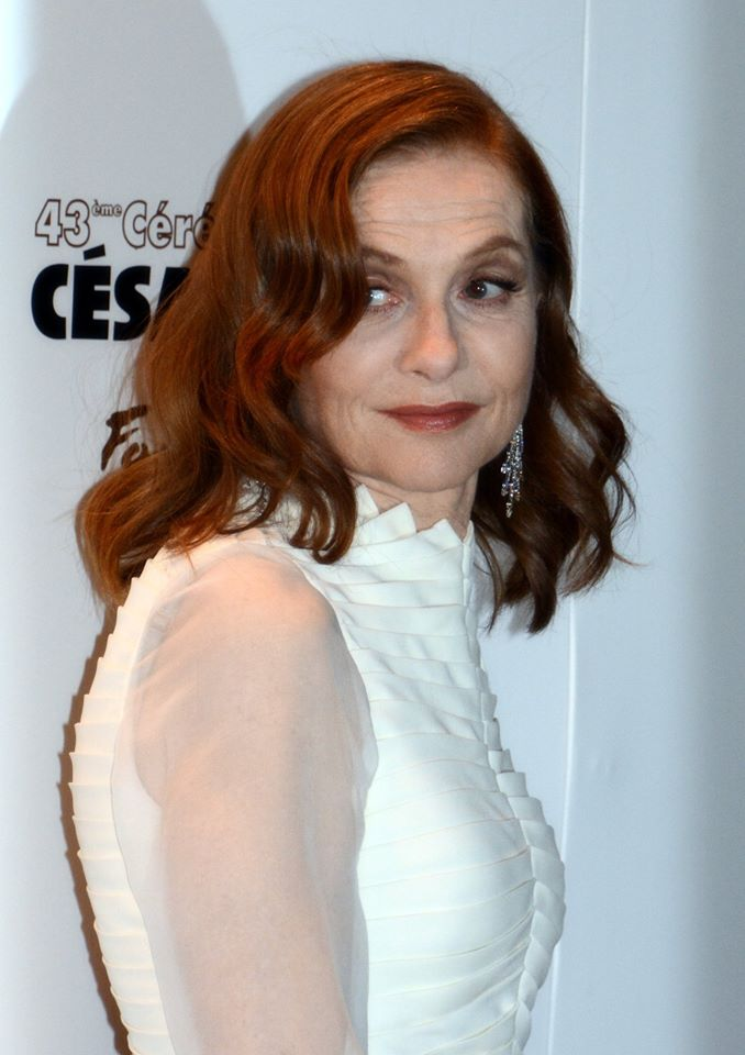 Isabelle Huppert à la cérémonie des César